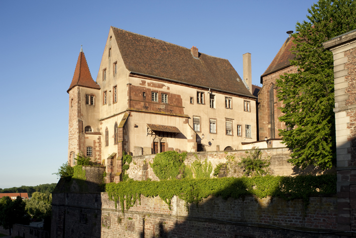 Ancien château dit Oberhof à Saverne (Bas-Rhin)